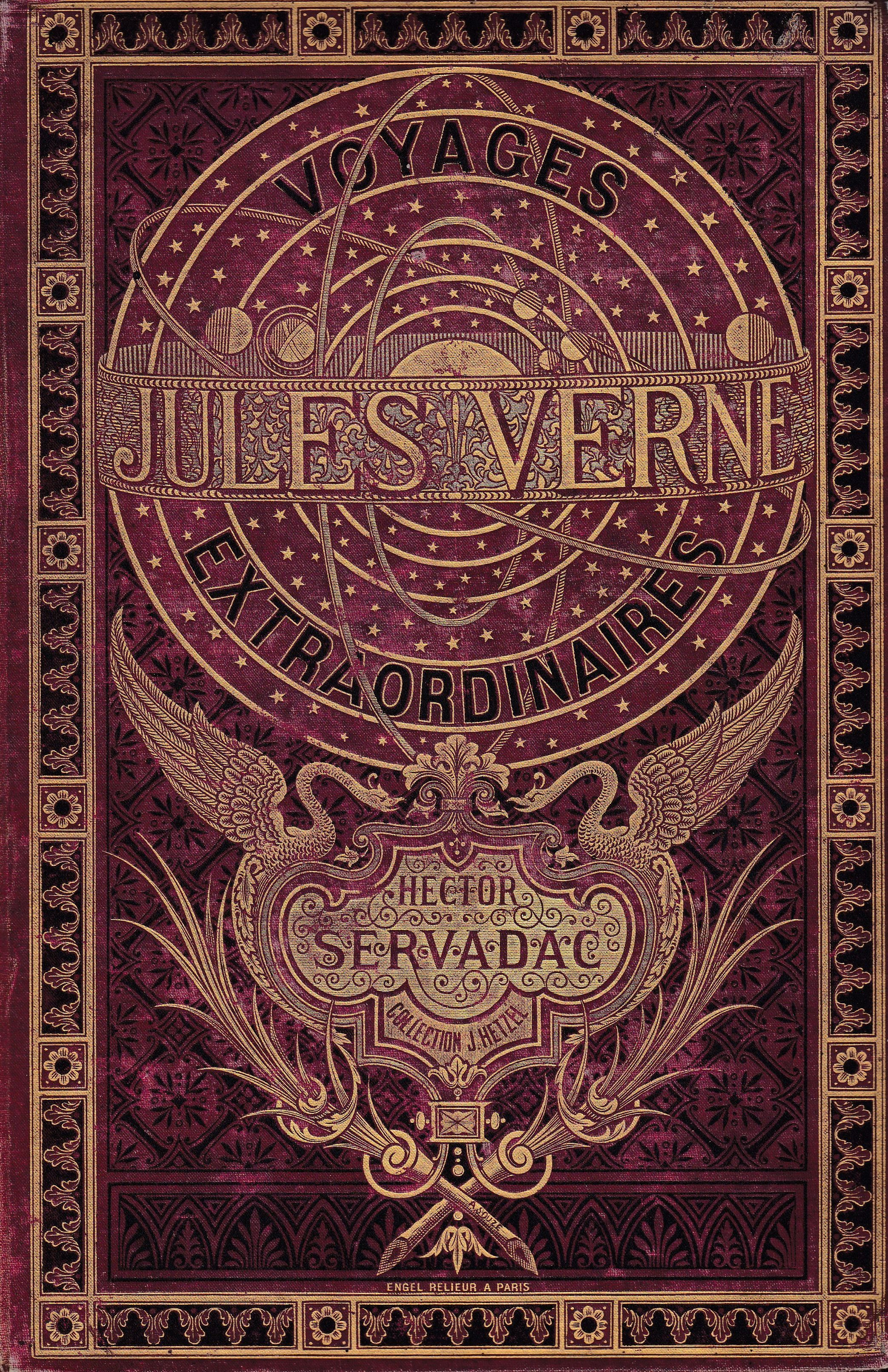 Jules Verne: Hector Servadac von 1878, Einbanddeckel